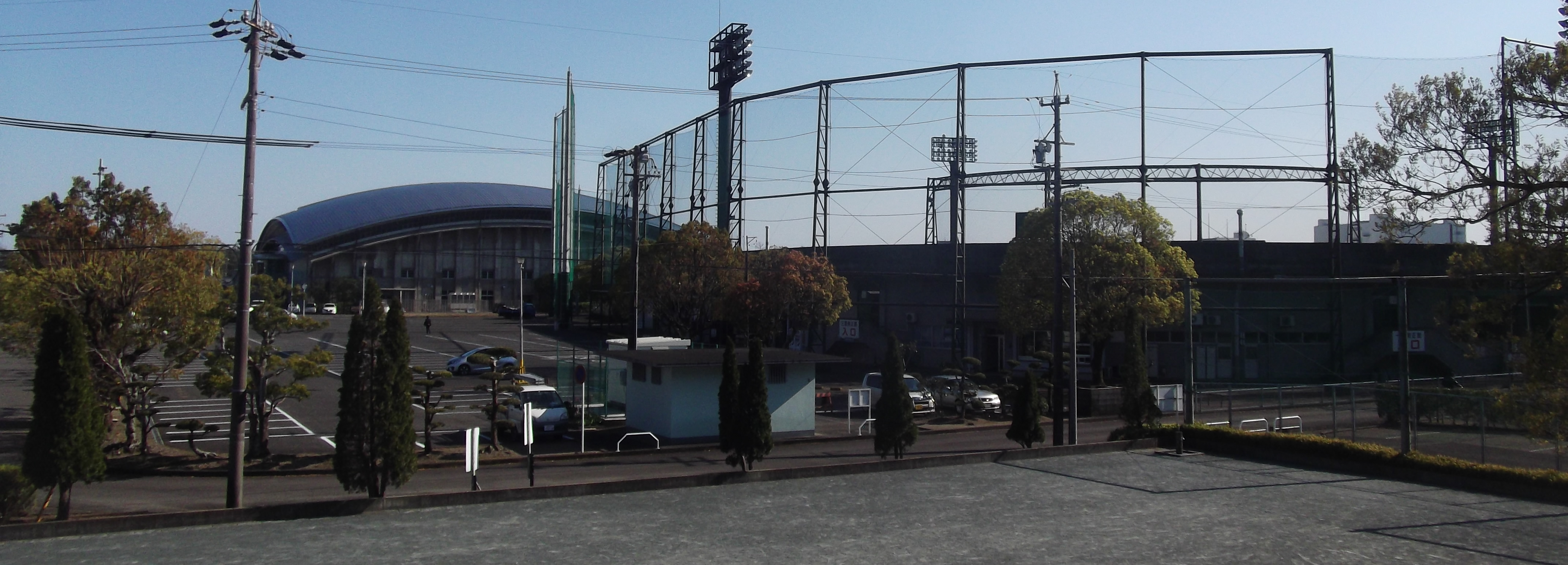 焼津市総合グラウンド。右は野球場、左奥は総合体育館 (シーガルドーム)